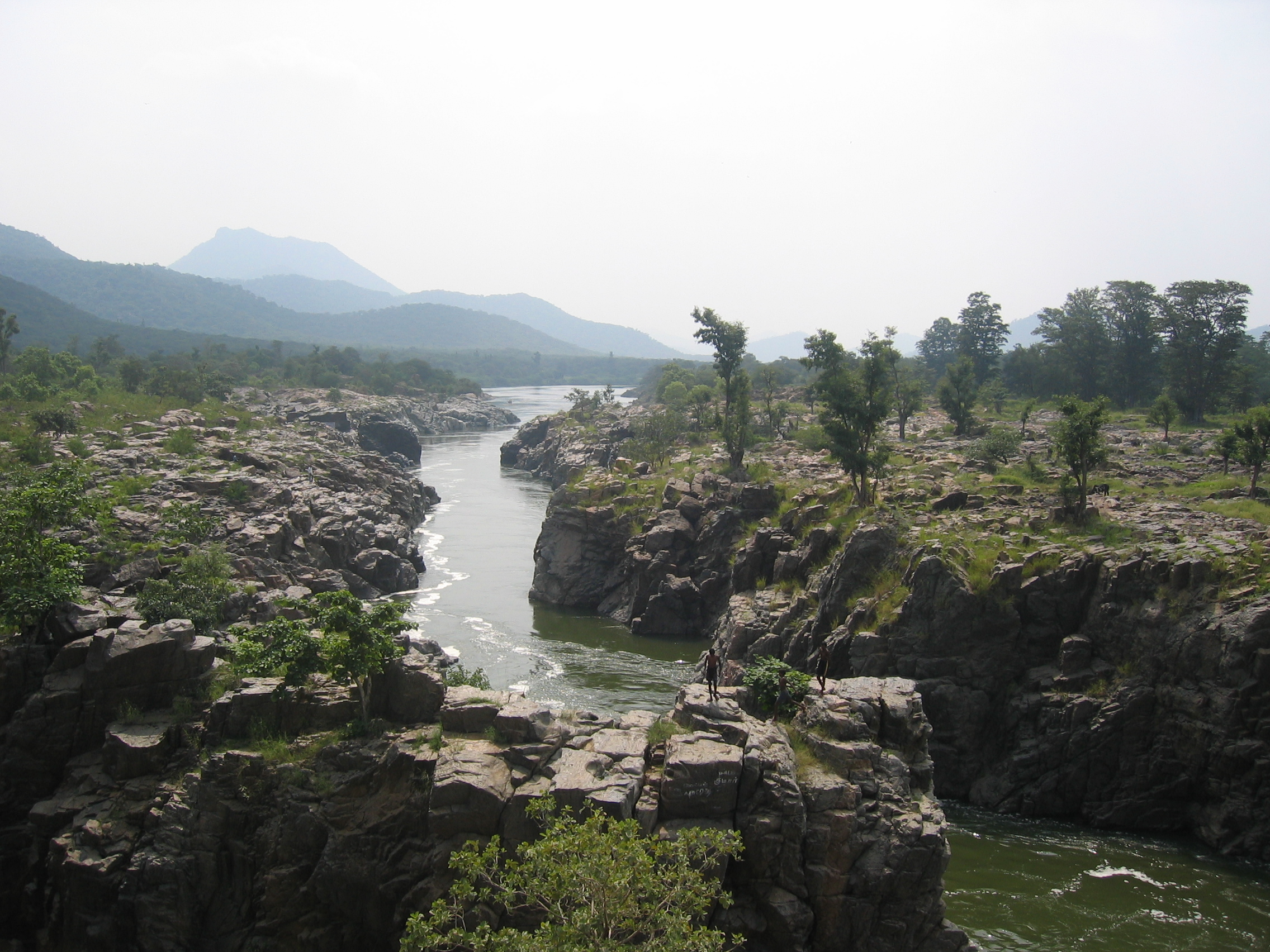 Oberlauf des Kaveri in den Ostghats kurz nach dem Passieren der Hogenakal-Wasserfälle an der Grenze zu Karnataka. Oberlauf der Kaveri nahe der Grenze zwischen Karnataka und Tamil Nadu.